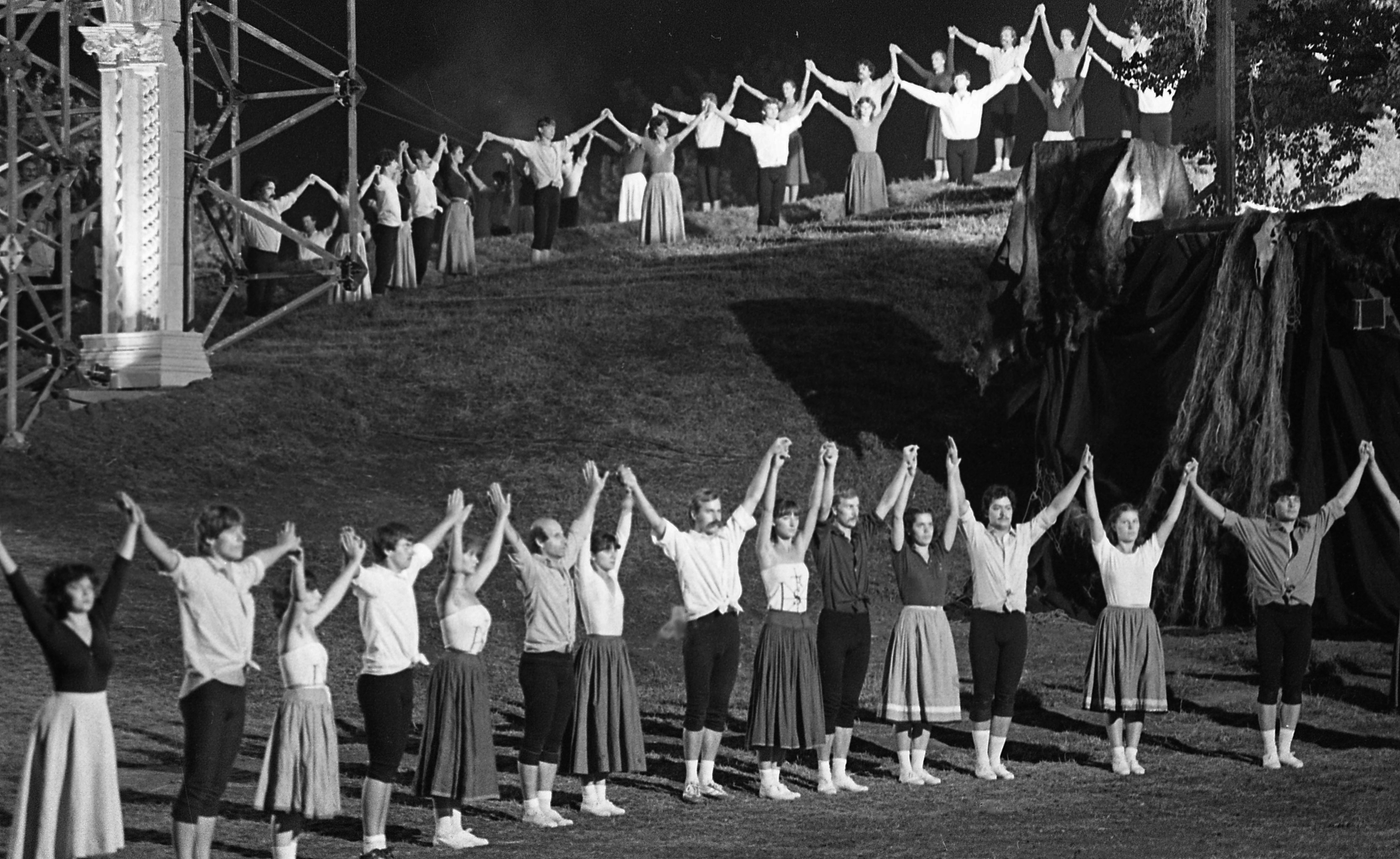 Szörényi Levente - Bródy János: István, a király című rockopera bemutatója és filmfelvétele 1983. augusztus 18-án a városligeti Királydombon. Rendező Koltay Gábor.